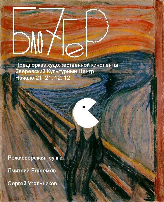 Фильм Блогер, афиша, Сергей Угольников, Дмитрий Ефремов